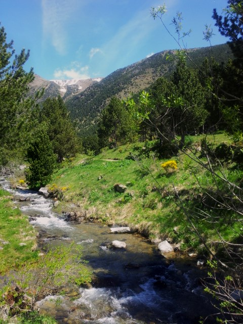 Riu Duran (Cerdanya) This is a a photo of a natural area in Catalonia, Spain, with id: ES5120022